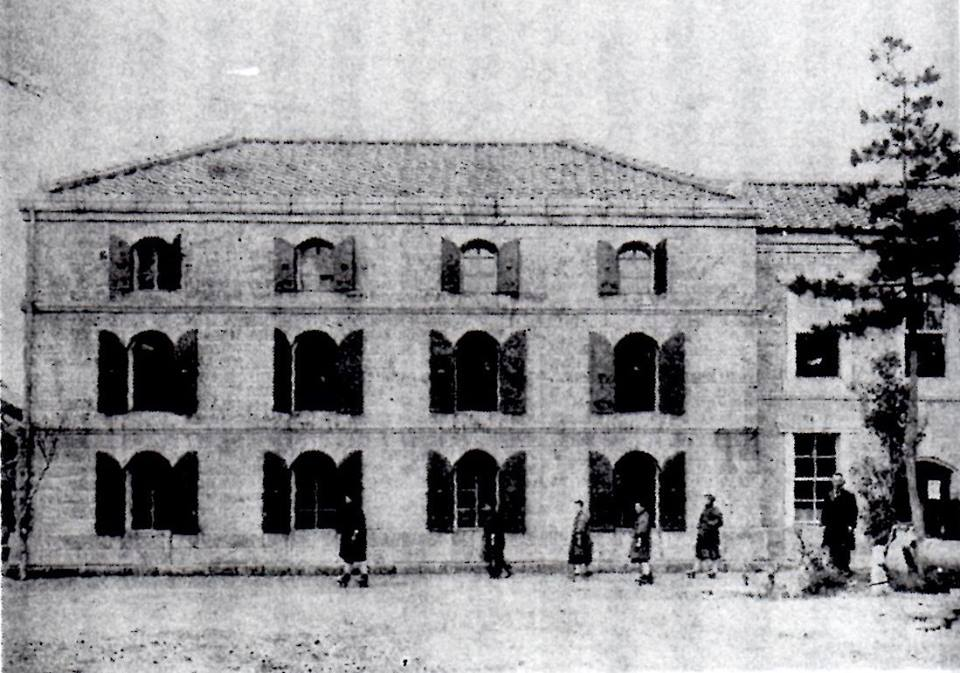 1923年開館の武生町立図書館。現在の越前市立図書館。